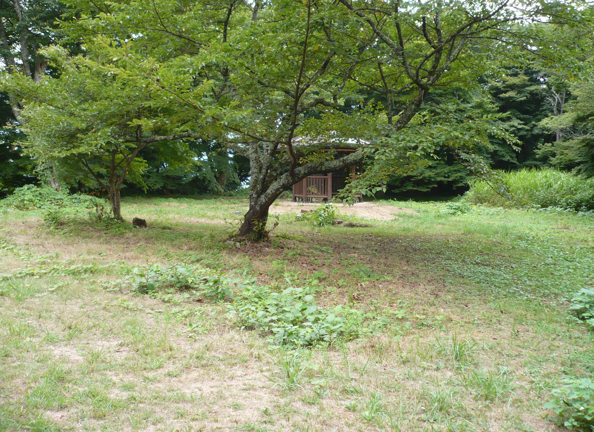 二の丸跡